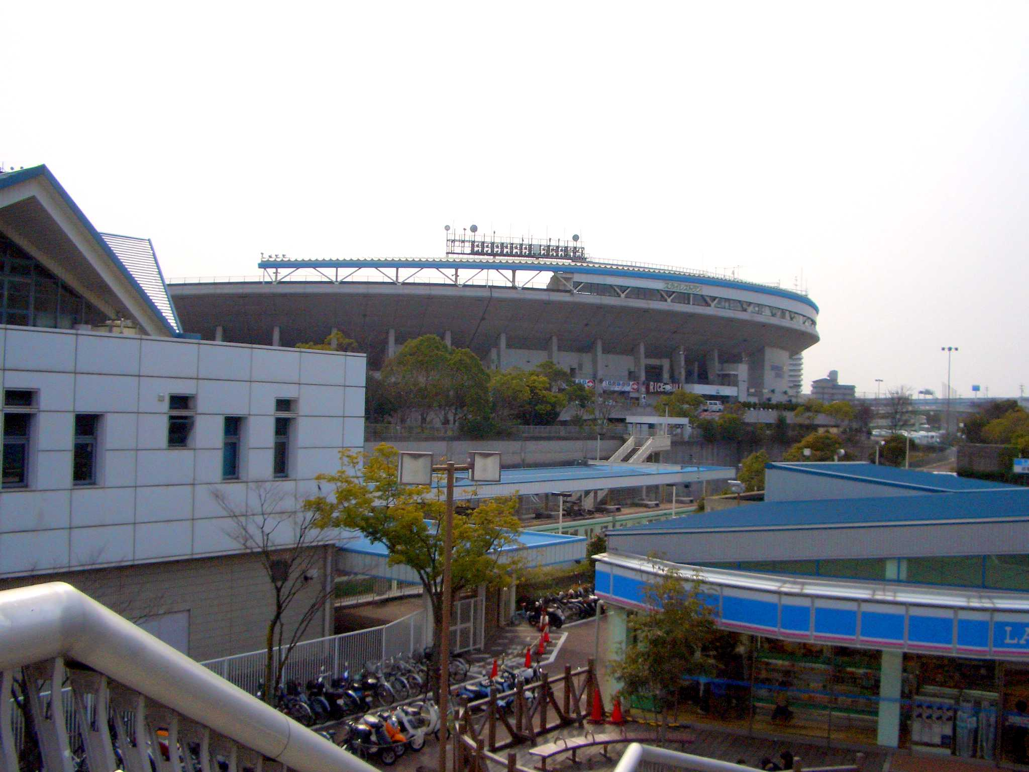 Skymark Stadium in KOBE,Japan.